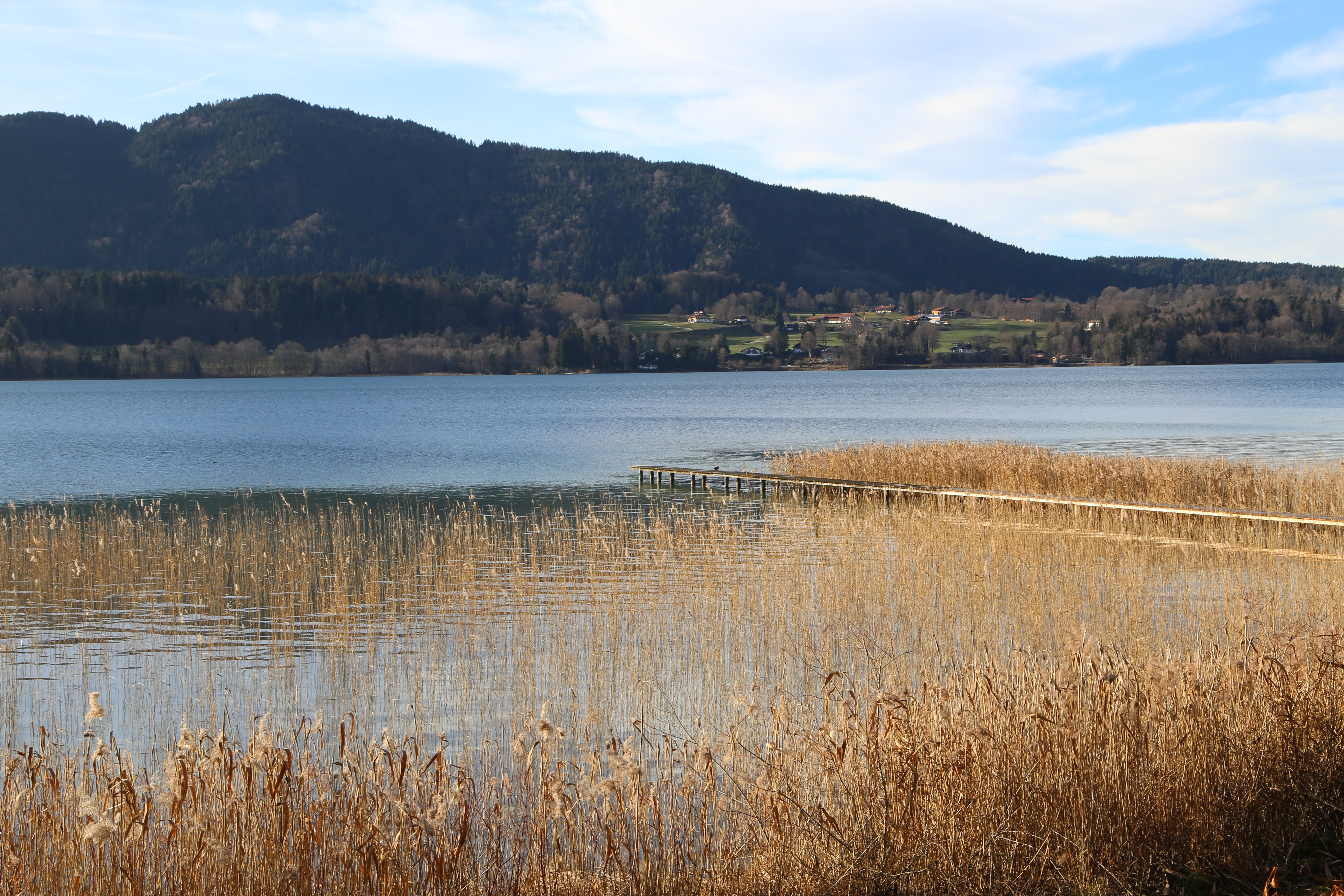 Tegernseeufer bei Sankt Quirin, Gmund am Tegernsee 01